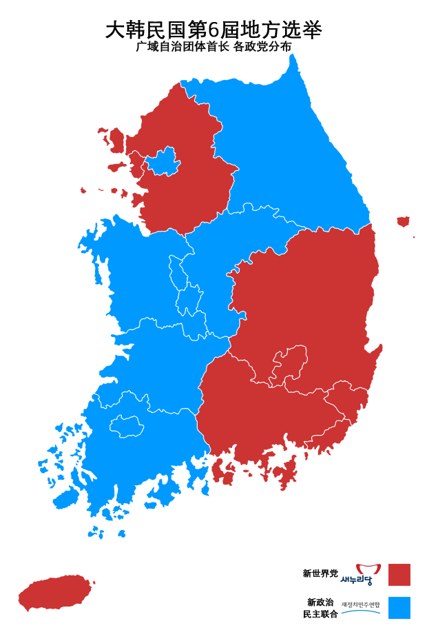 大韩民国第6届地方选举，广域自治团体首长各政党分布图（简体中文版）